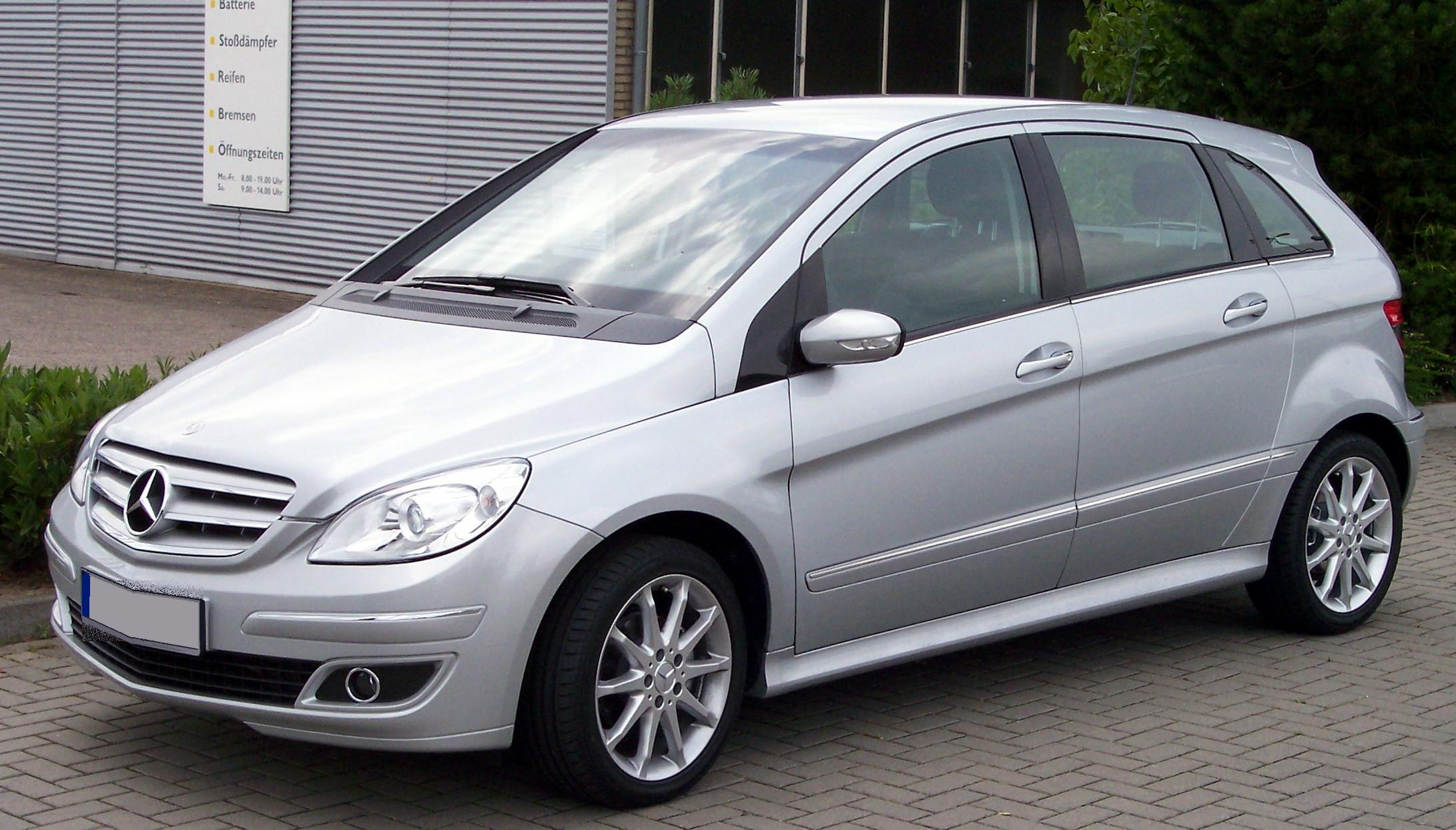 Mercedes Benz B 170 silver vl